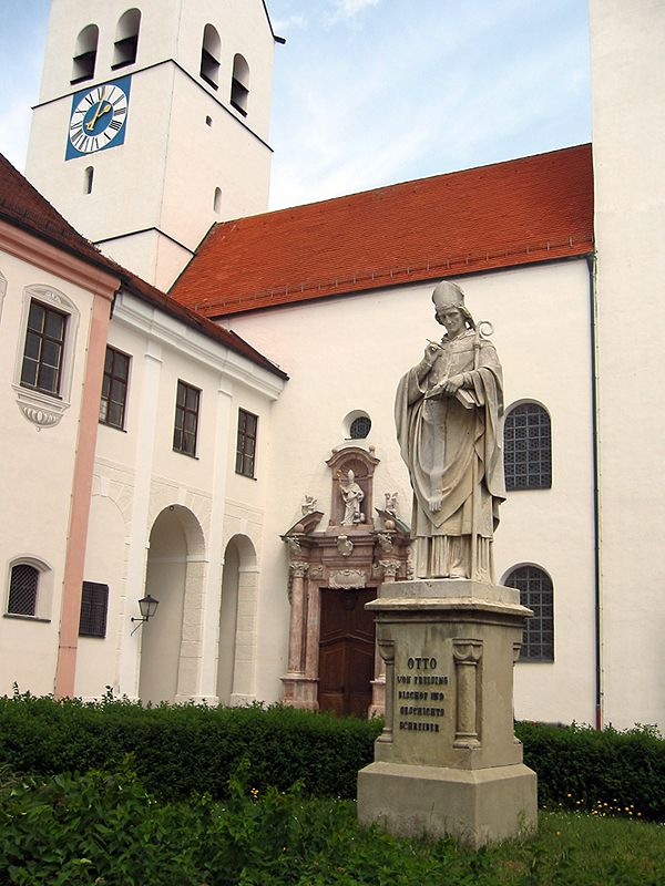 Denkmal für Otto von Freising auf dem Freisinger Domberg. Bildhauer: Kaspar von Zumbusch